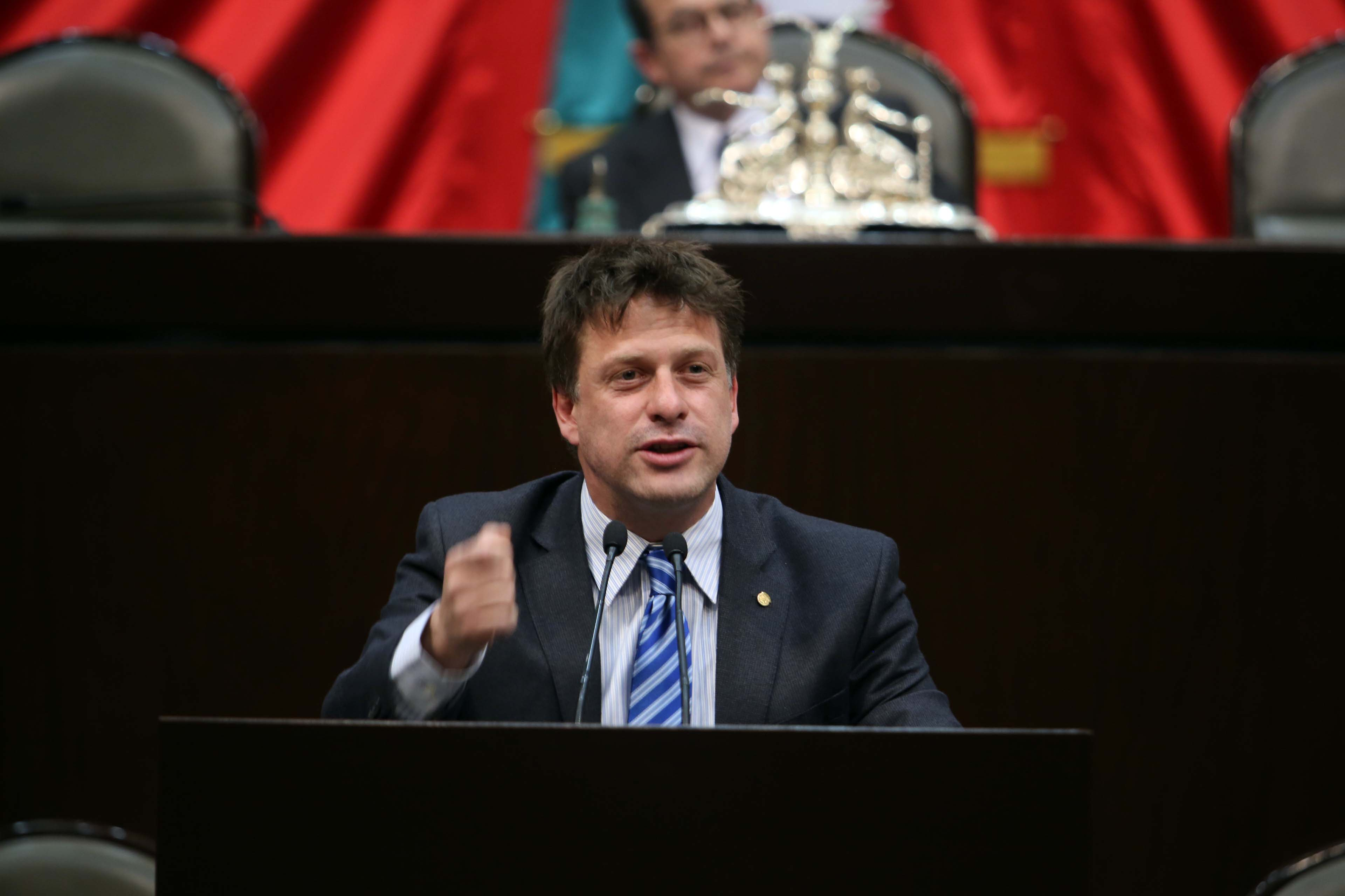 Camara de Diputados